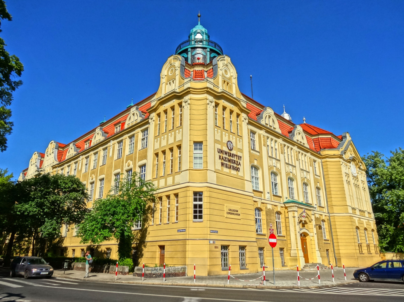 Budynek ul. Kopernika 1 w Bydgoszczy - dawna Miejska Szkoła Realna 1905-1907, ob. Collegium Copernicanum Uniwersytetu Kazimierza Wielkiego w Bydgoszczy